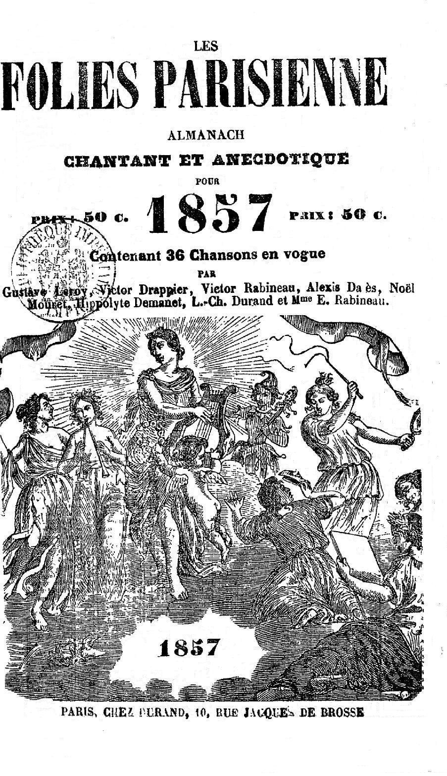 Couverture d'un recueil de chansons de goguettes publié pour 1857 à Paris par l'éditeur et goguettier Charles Durand.